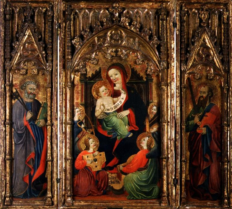 Firmado Johannes Hispalensis. El tríptico representa a la Virgen María y al Niño Jesús acompañados por unos ángeles músicos con san Pedro y san Pablo. En la tabla central, de doble anchura que las laterales, presenta a la Virgen entronizada y al Niño en su regazo, con la filacteria "yo soy el Alfa y el Omega". Cuatro ángeles con instrumentos musicales rodean a María y, en las alas del tríptico, se efigia a San Pablo y a San Pedro. Los personajes sacros figuran sobre fondos dorados y gofrados, bajo arcos de tracería dorada y ornamentados.